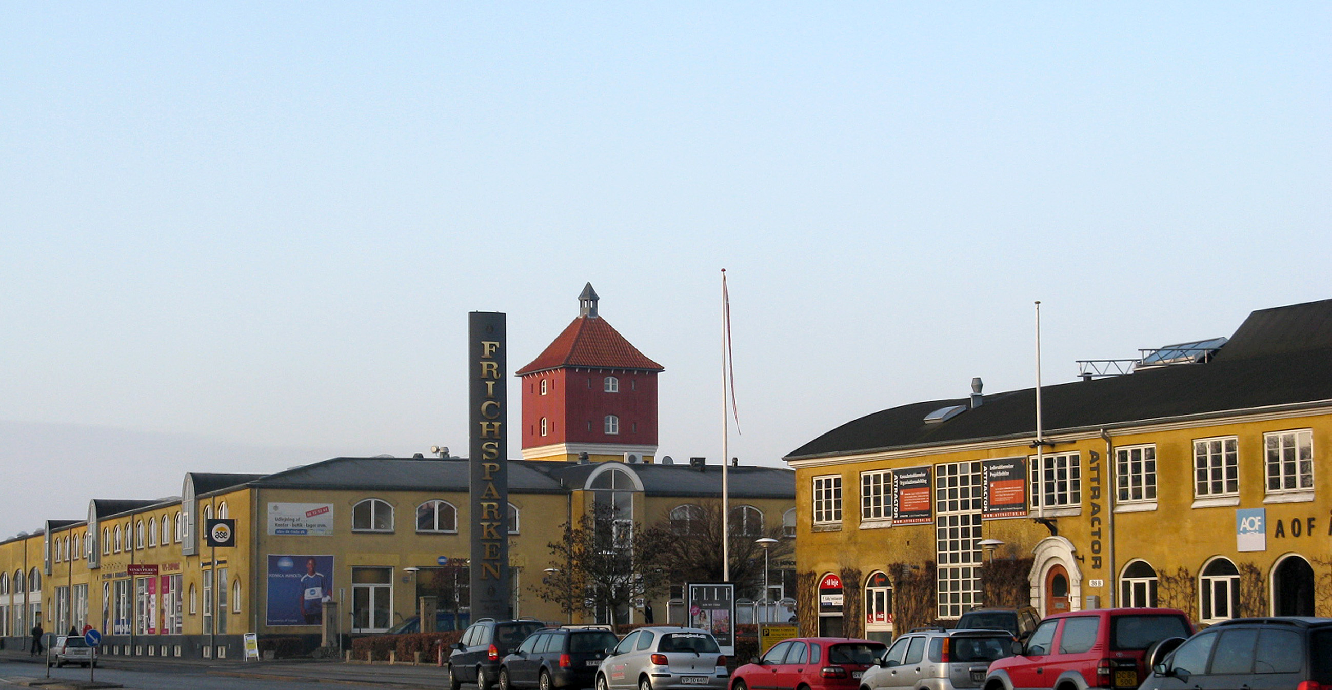 Den tidligere Frichs Masikfabrik i Århus, set mod nordvest